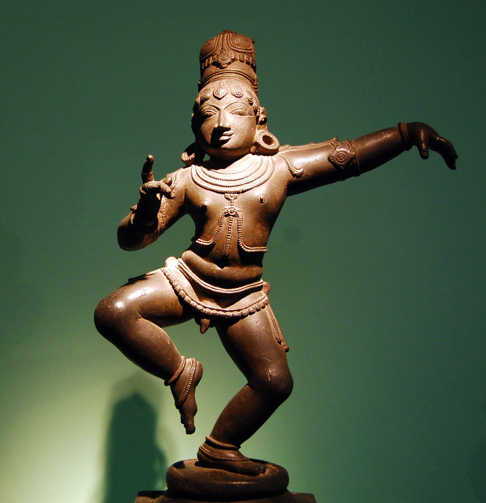 Balakrishna. National Museum